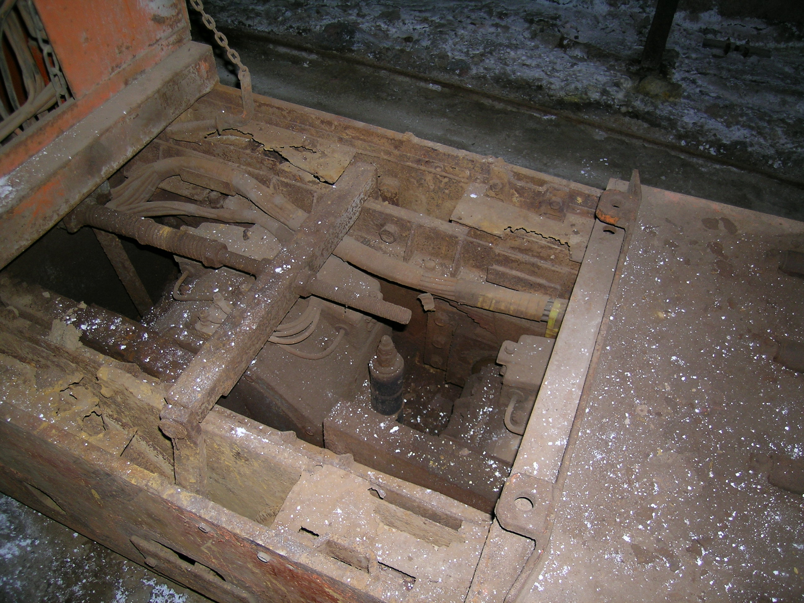 Fahrmotor einer BBA B 360.